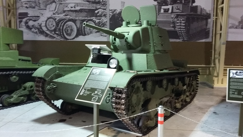 Легкий танк Т-26 образца 1939 г.